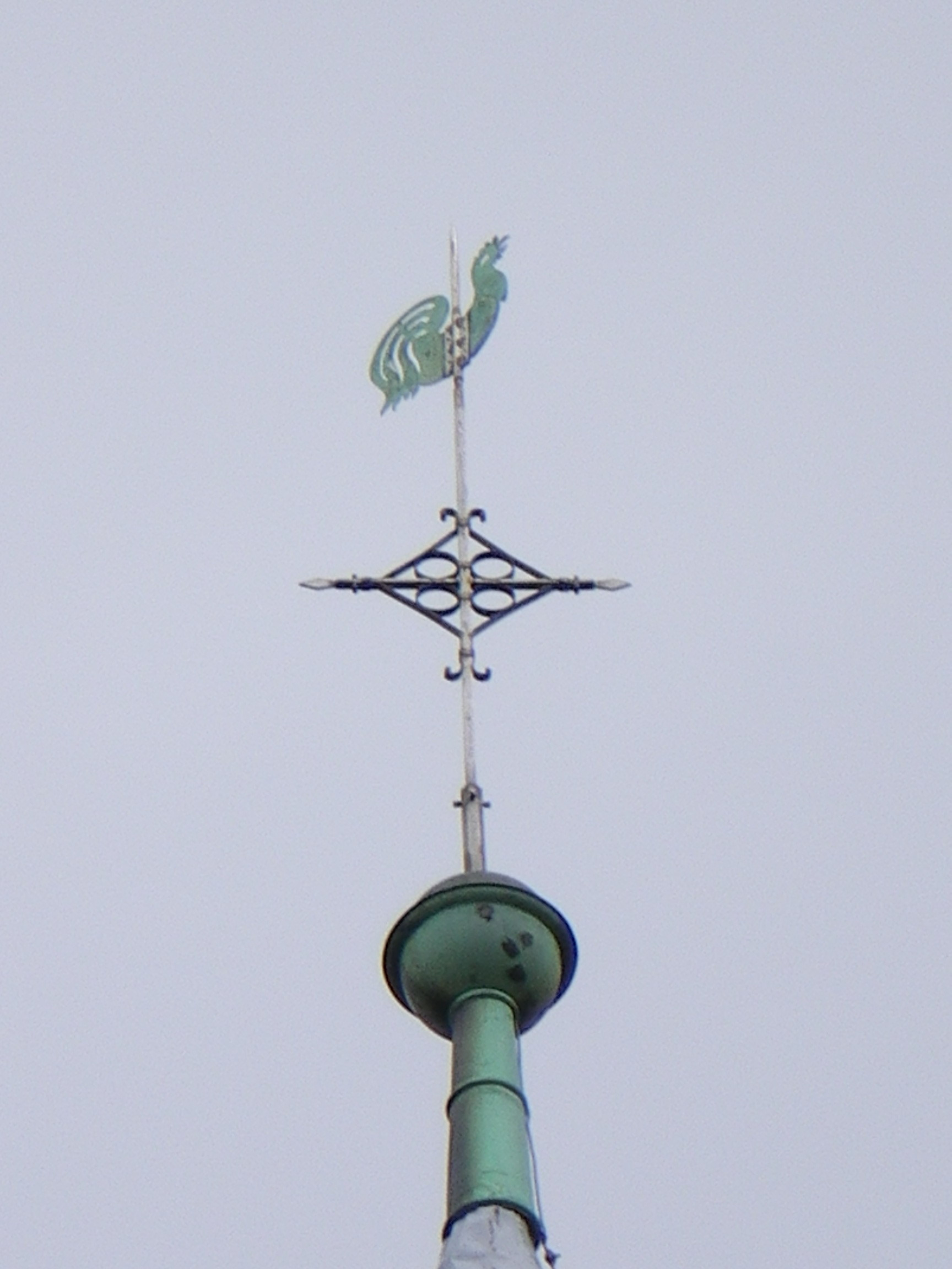 Die mit Windrose und Hahn geschmückte Kirchturmspitze